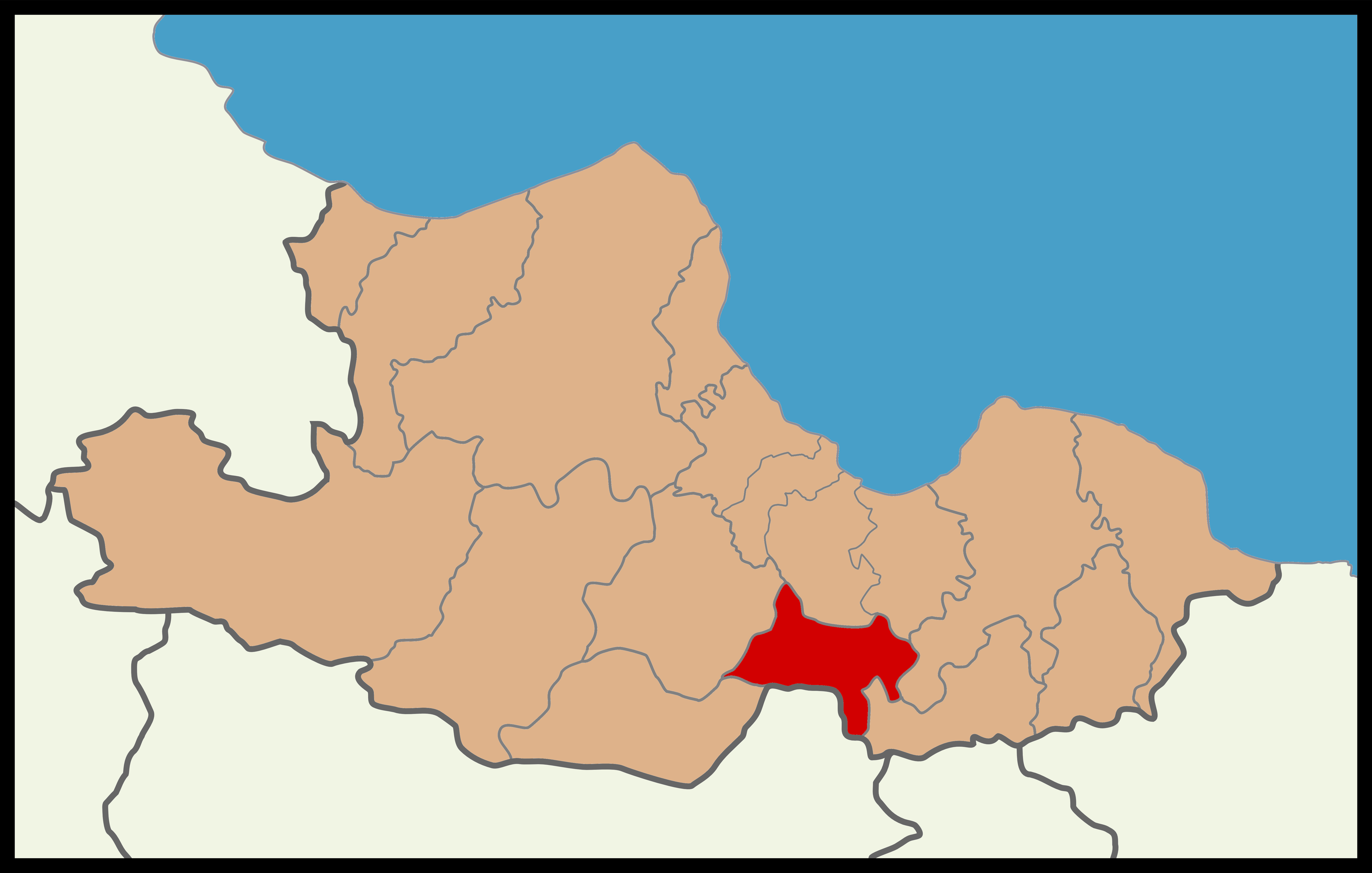 Samsun'un Asarcık ilçesinin 2014 Türkiye yerel seçimleri haritası.